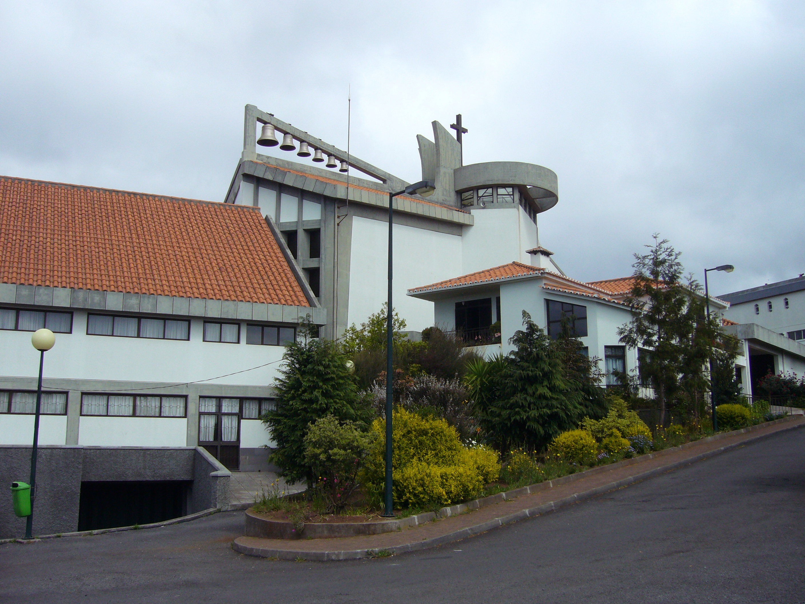 Nový kostel v obci Camacha